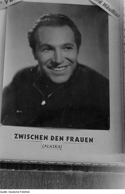 Original image description from the Deutsche FotothekSchauwerbung "Zwischen den Frauen (Alaska)"